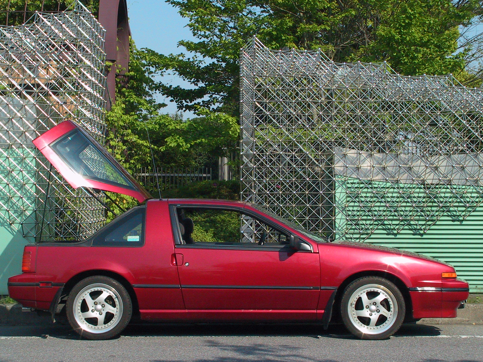 Nissan EXA Canpoy L.A.バージョン Type-SE